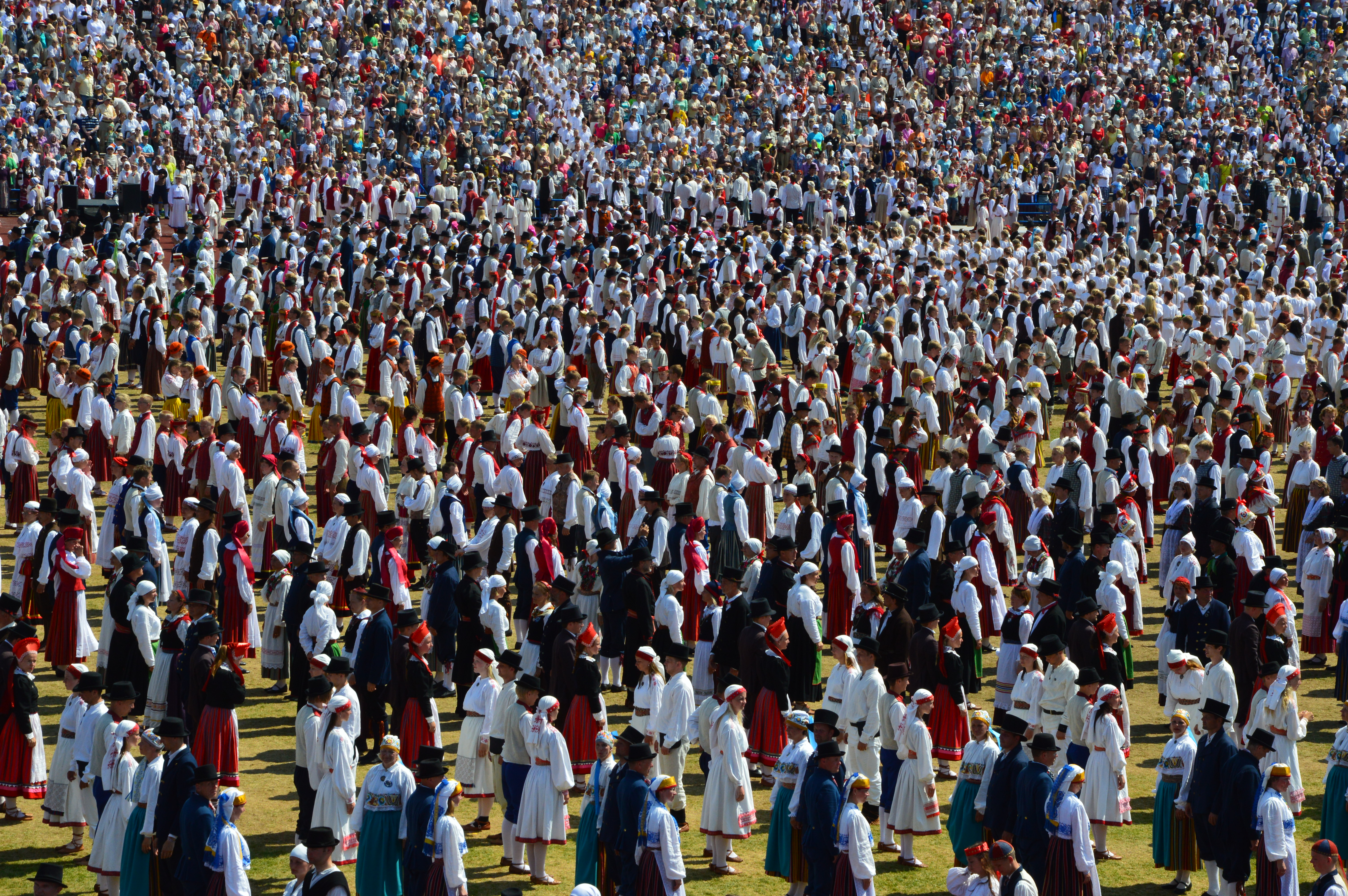 XIX üldtantsupidu Kalevi keskstaadionil.